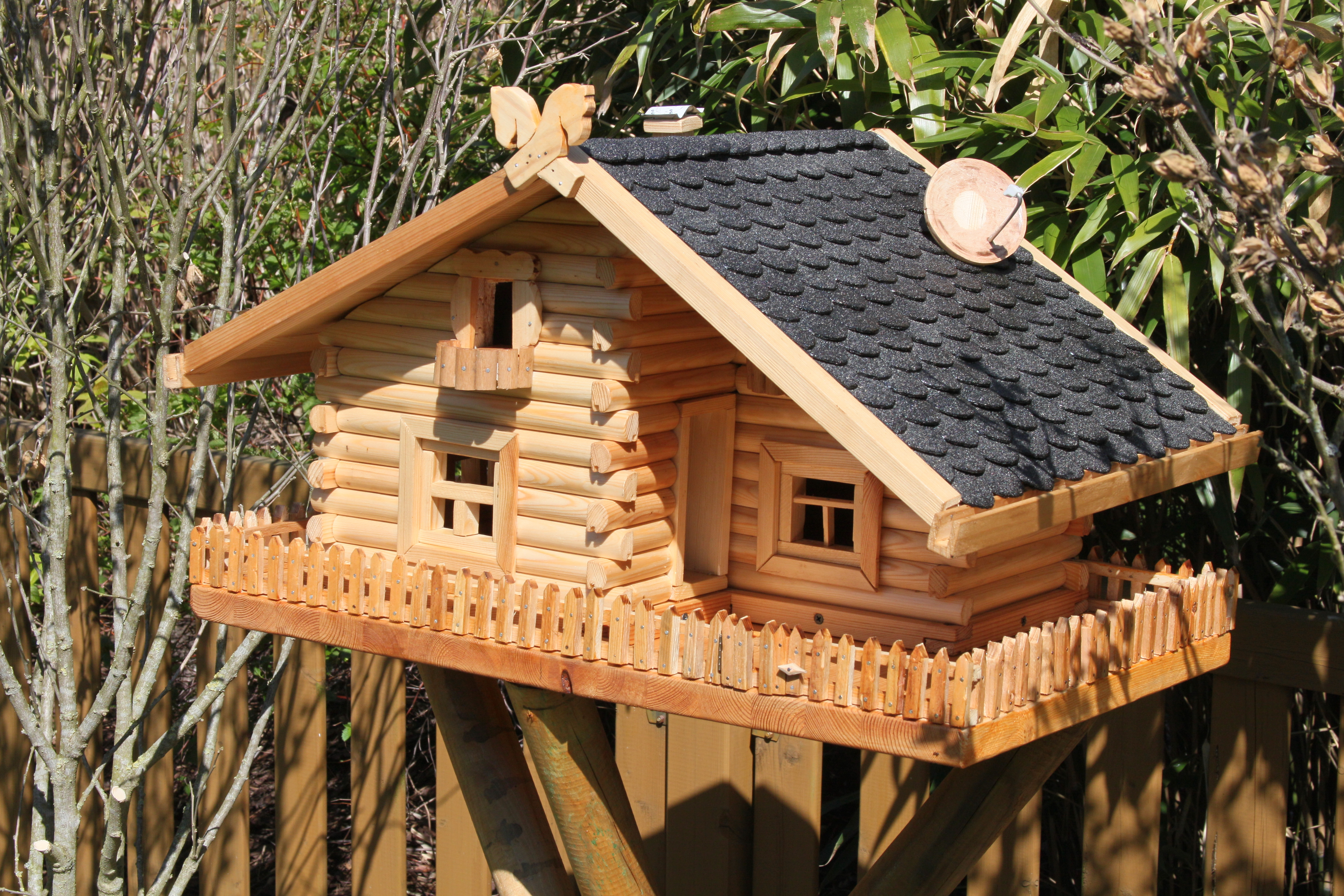 Vogelhaus Modell "Eduard"